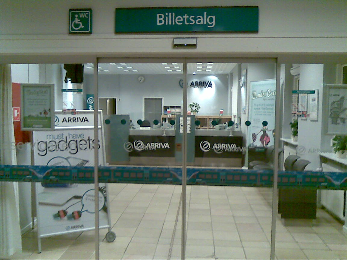 Arriva's billetsalg på Viborg Station / Viborg Banegård